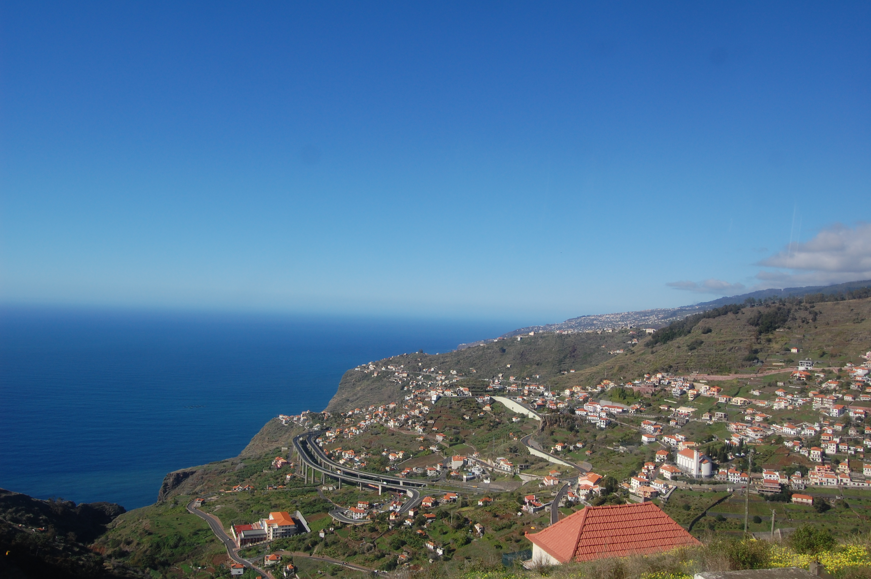 Campanário - Quinta Grande, Madeira